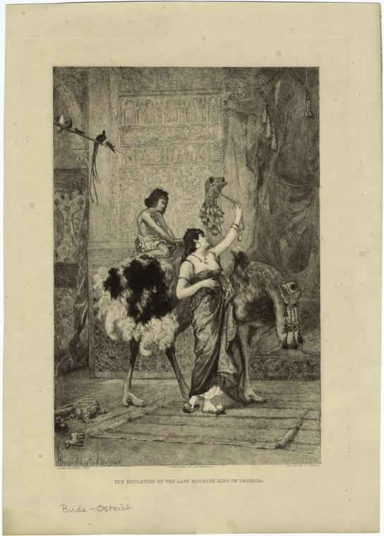 « L'éducation du dernier roi Maure de Grenade »